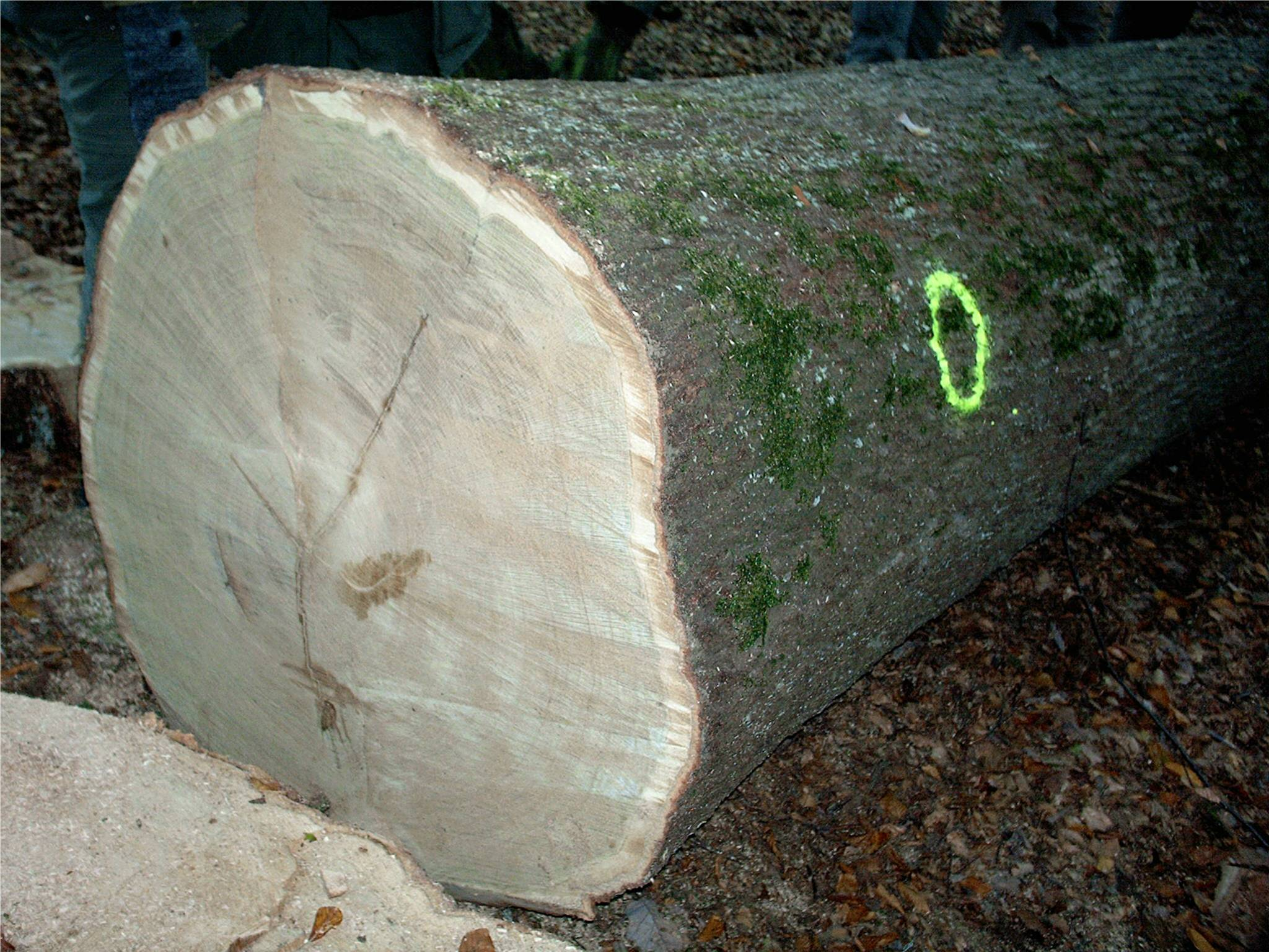 Eichen-Wertholzstamm mit Furnierqualität aus dem Spessart